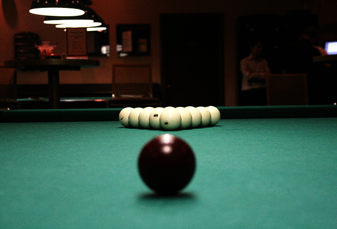 Бильярд